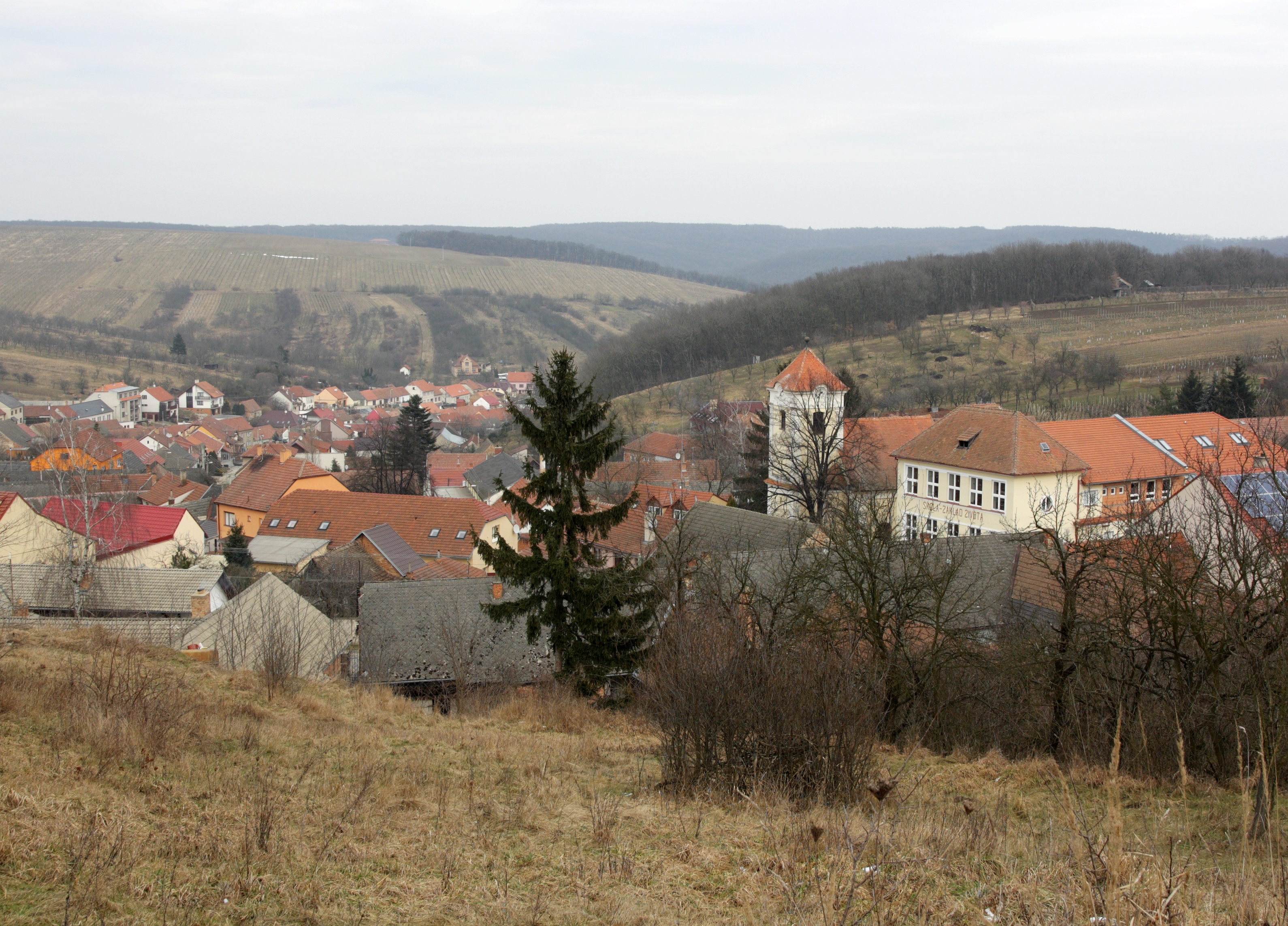 Němčičky (okres Břeclav) - pohled z vrchu Puclejty.